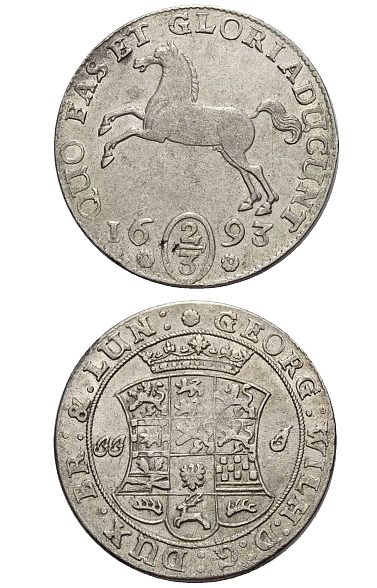 2/3 Taler, geprägt 1693 in Celle von Georg Wilhelm von Braunschweig-Lüneburg. Welter 1589.